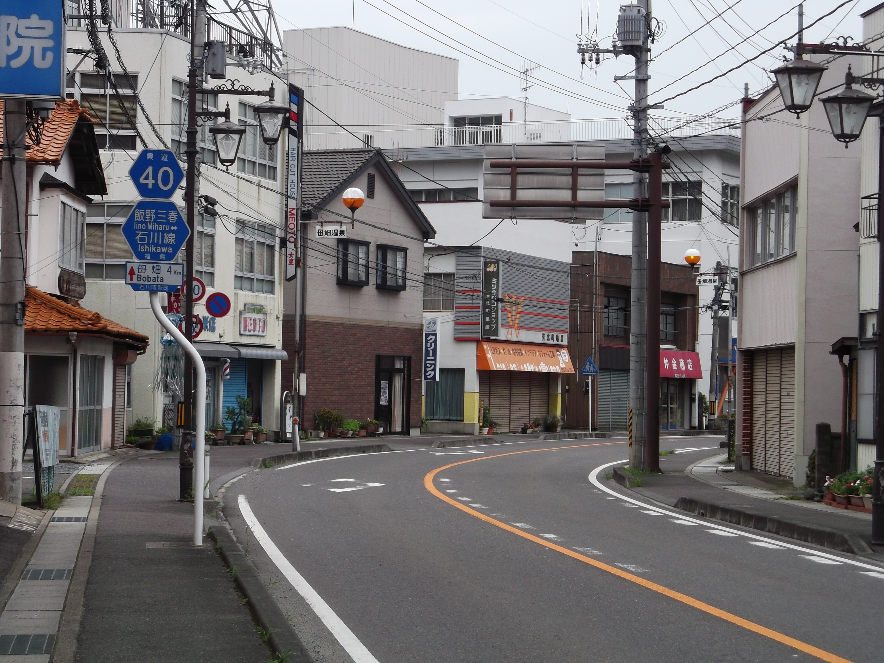 福島県道40号飯野三春石川線(福島県石川町）